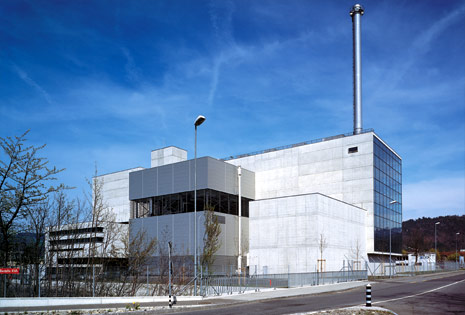 Termovalorizzatore Thun